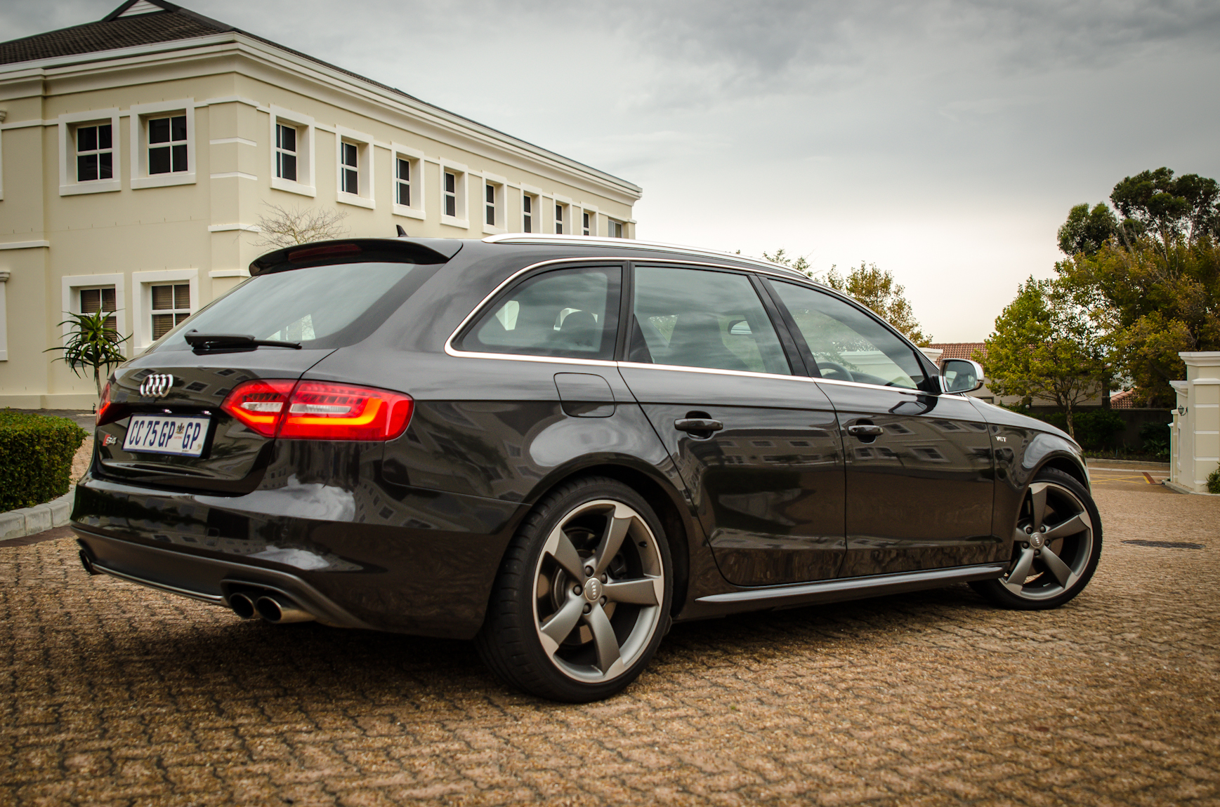 Audi S4 Avant